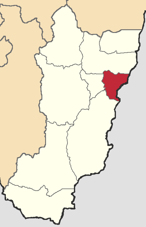 Mapa localizador del cantón en Zamora Chinchipe, Ecuador